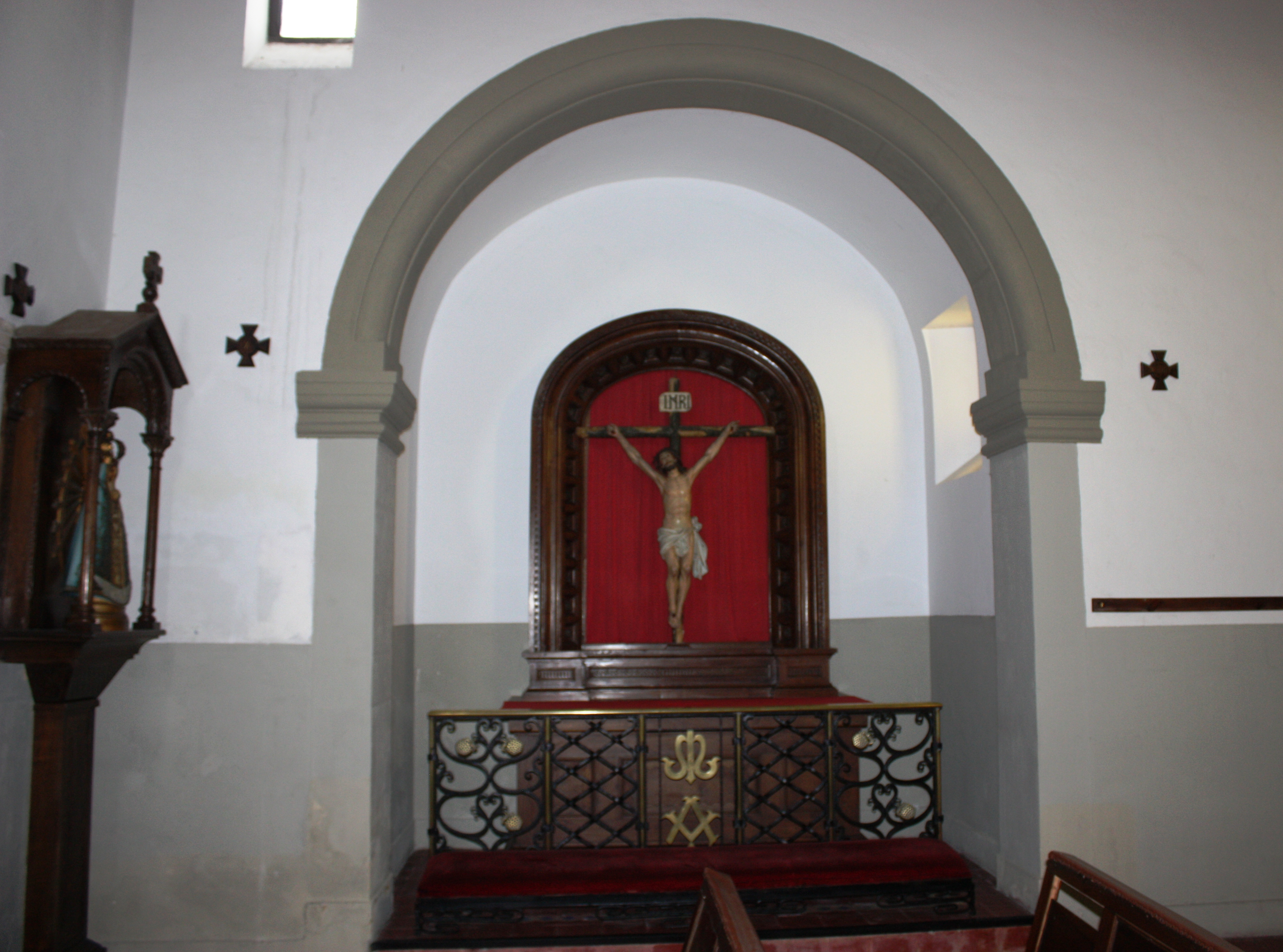 Santuario de Loreto en Colunga-Asturias